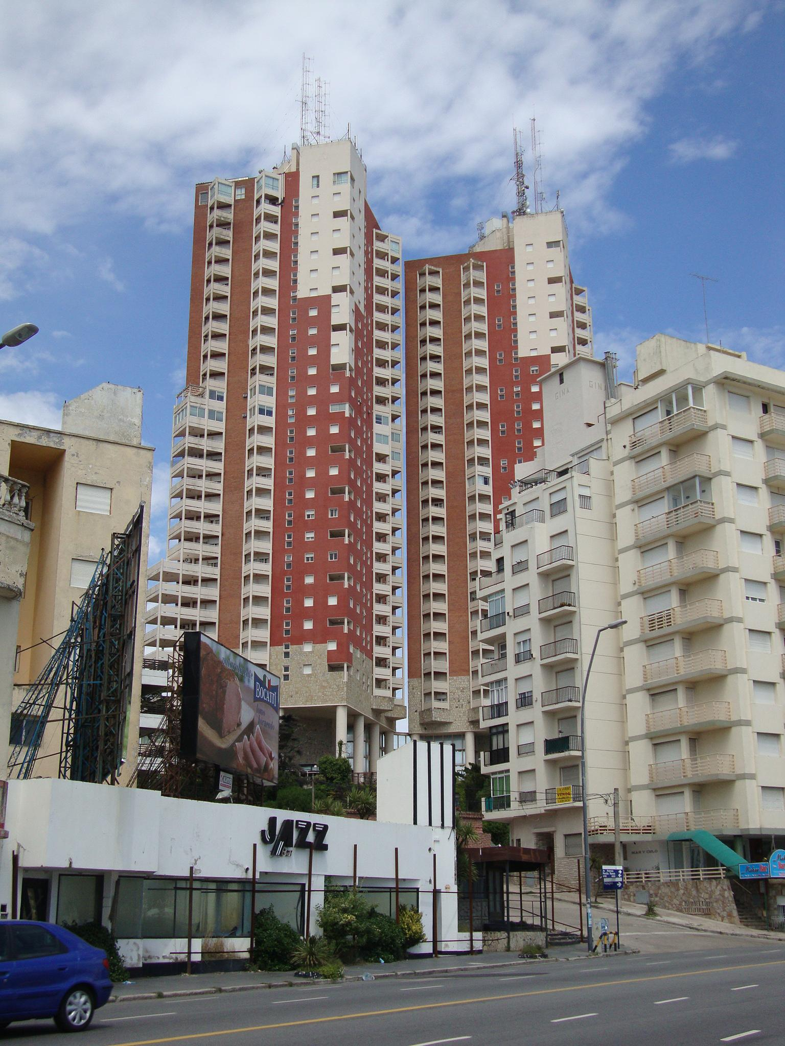 Vista de Torres de Manantiales Apart Hotel desde el Boulevard Marítimo Patricio Peralta Ramos y calle Pellegrini en Mar del Plata, provincia de Buenos Aires, Argentina.